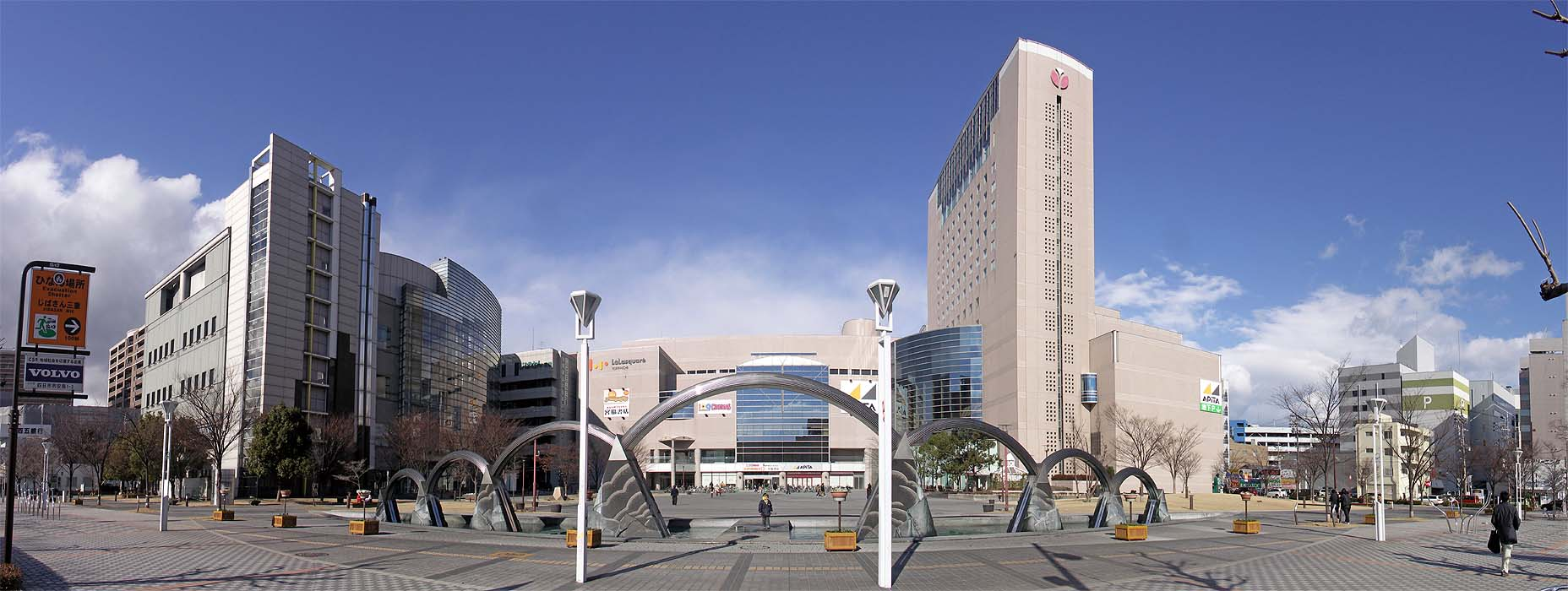 四日市市博物館、ララスクエア、都ホテル